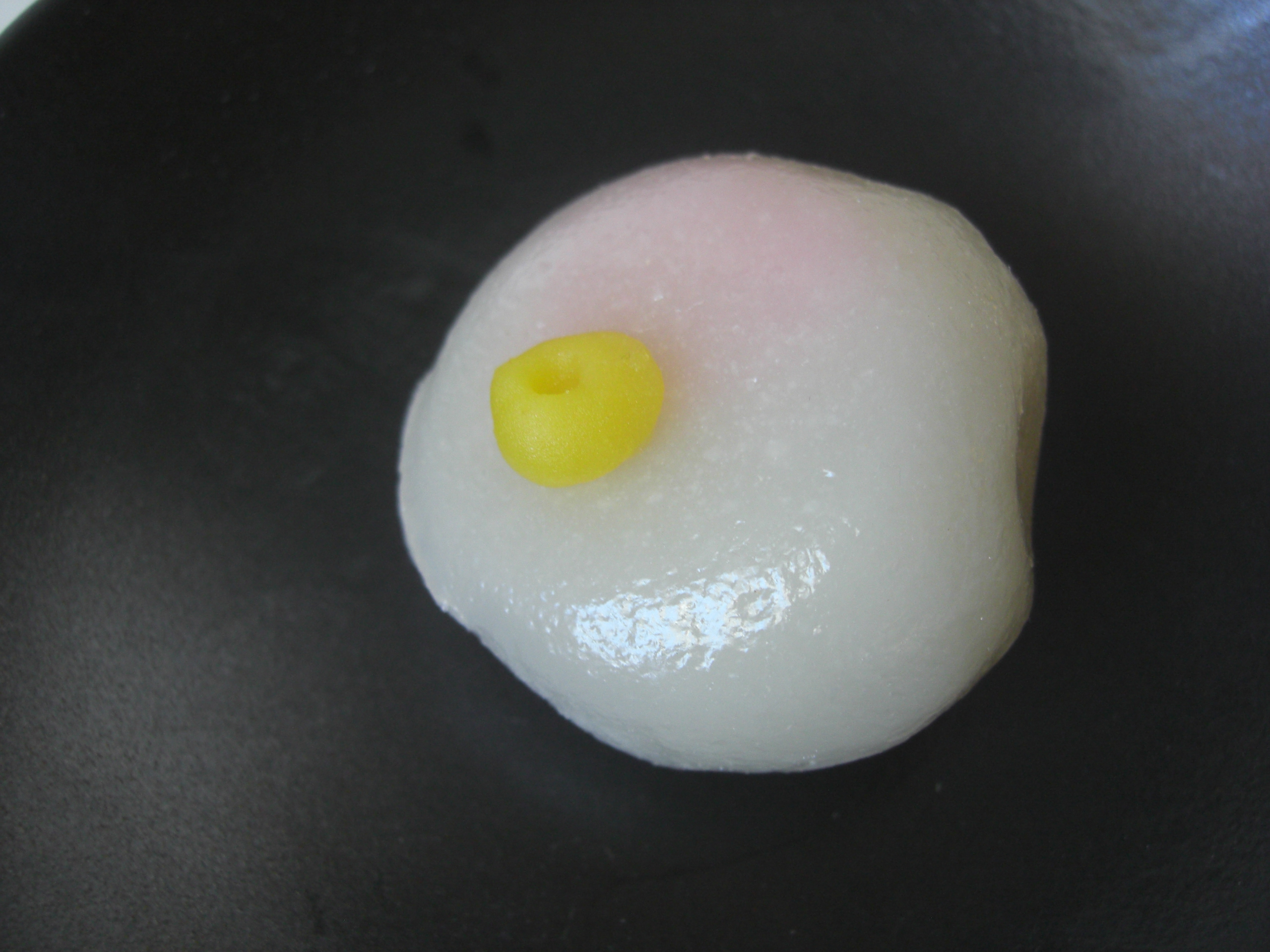 玉椿（たまつばき） 谷川製（ういろう皮） 美濃忠 12月購入